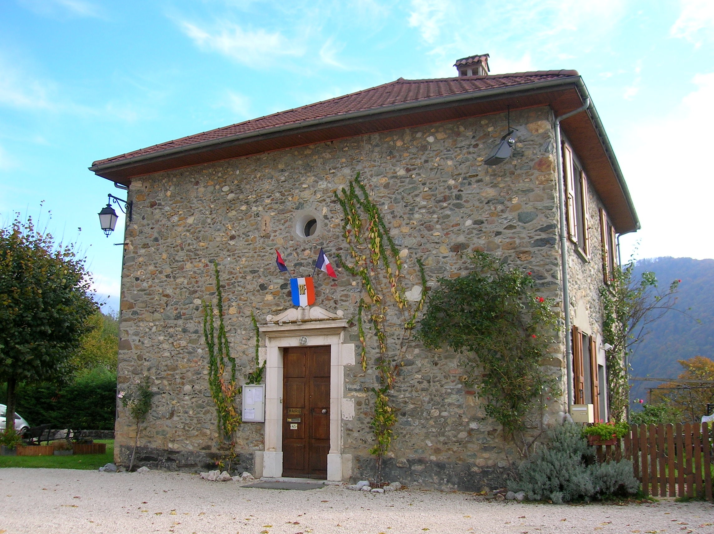 Venon (Isère), France